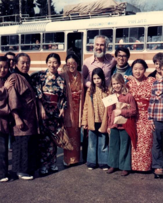 התרגשות רבה הייתה כאשר באו האוטובסים של חברי המקויה.הילדים הכינו שירים לקבלת הפנים וגם האורחים הגיעו עם תוכנית עשירה